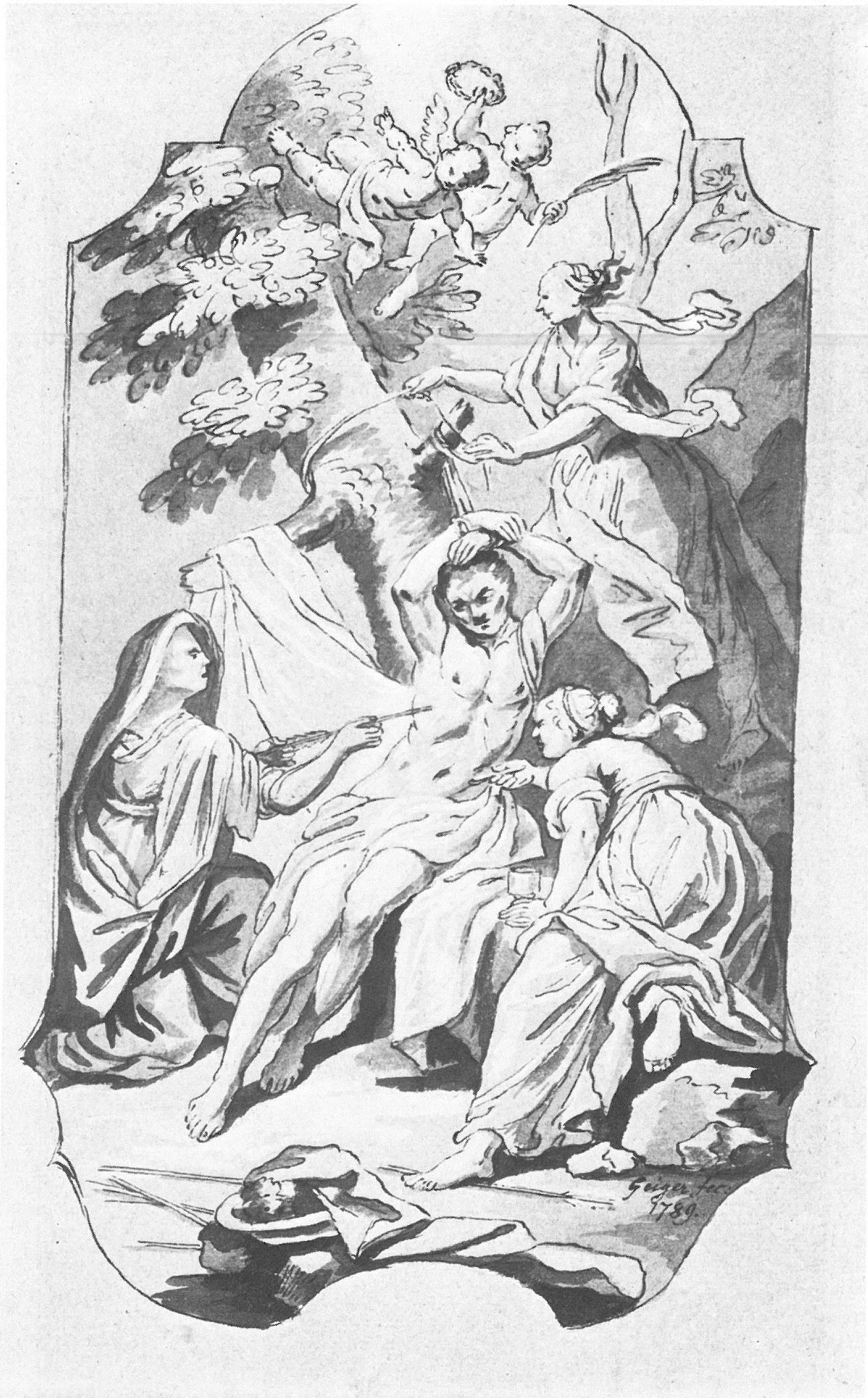 Die Sebastianspflege, Paraphrase auf das Altarblatt in der Neumannkirche Münsterschwarzach, Conrad Geiger 1789